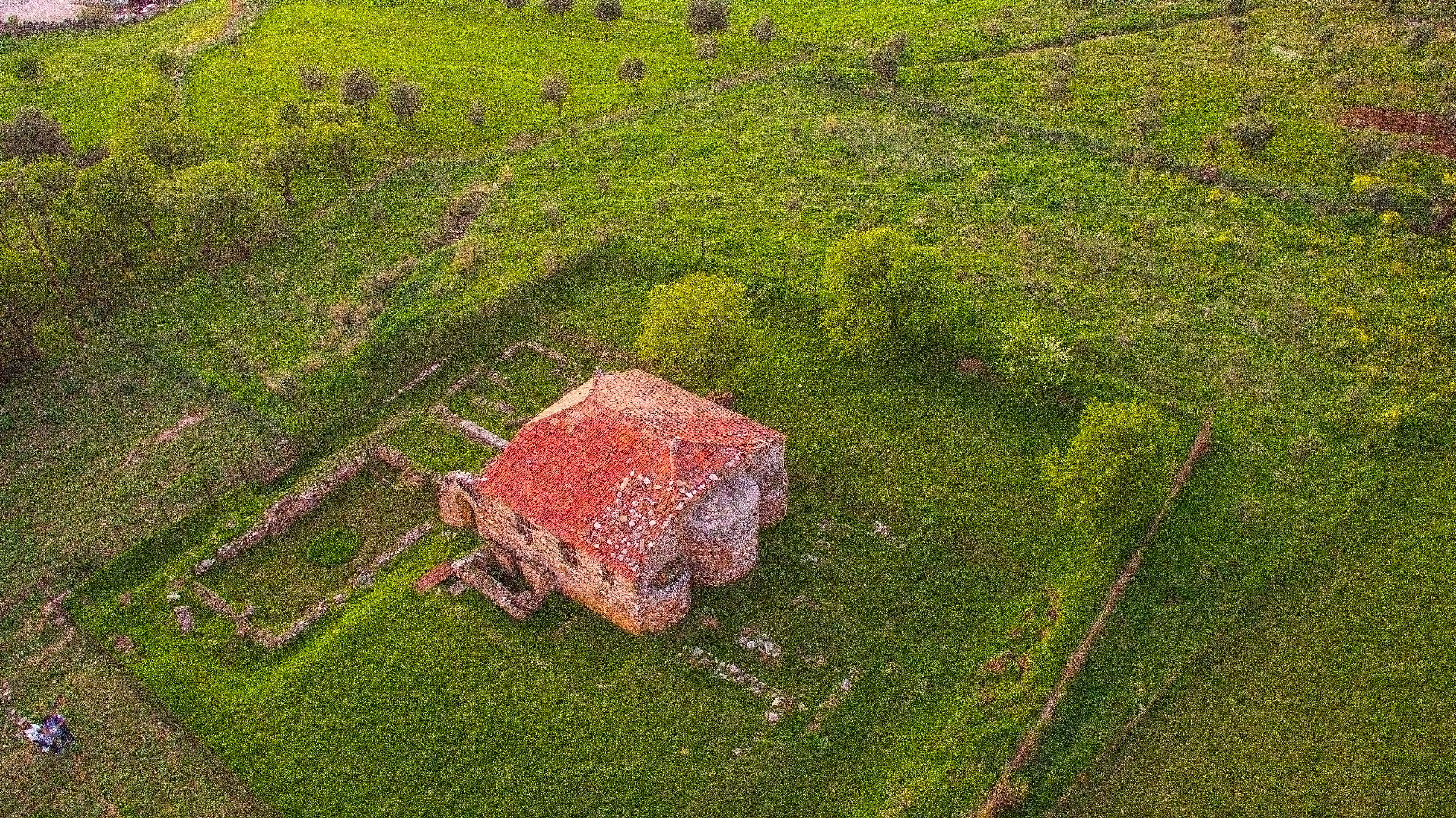 Εκκλησία στην Κάτω Πλατανόβρυση Αχαΐας